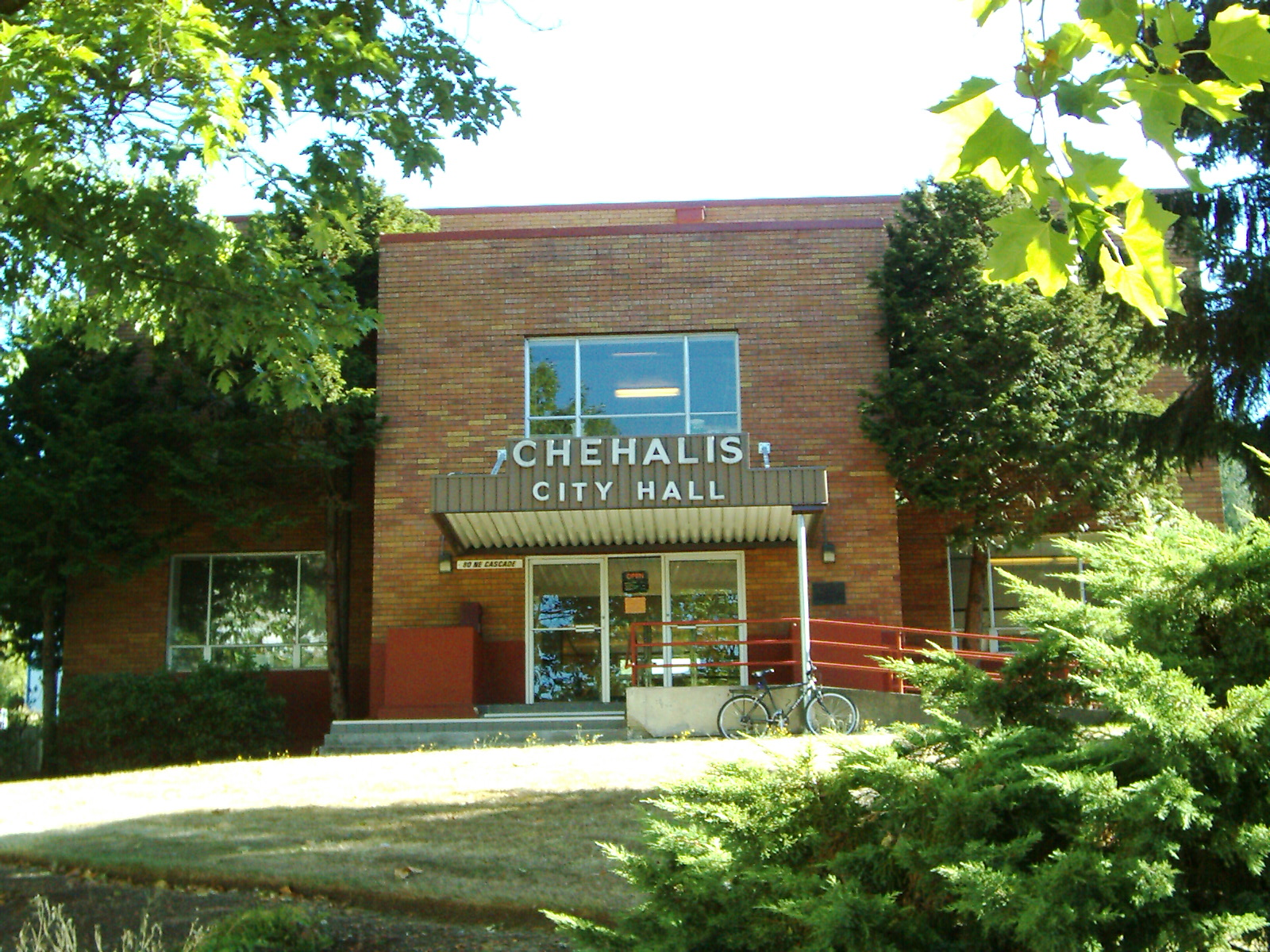 Rathaus in Chehalis, Washington Sonstiges: ...